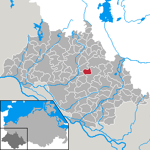 Strohkirchen in Mecklenburg-Vorpommern - district Ludwigslust